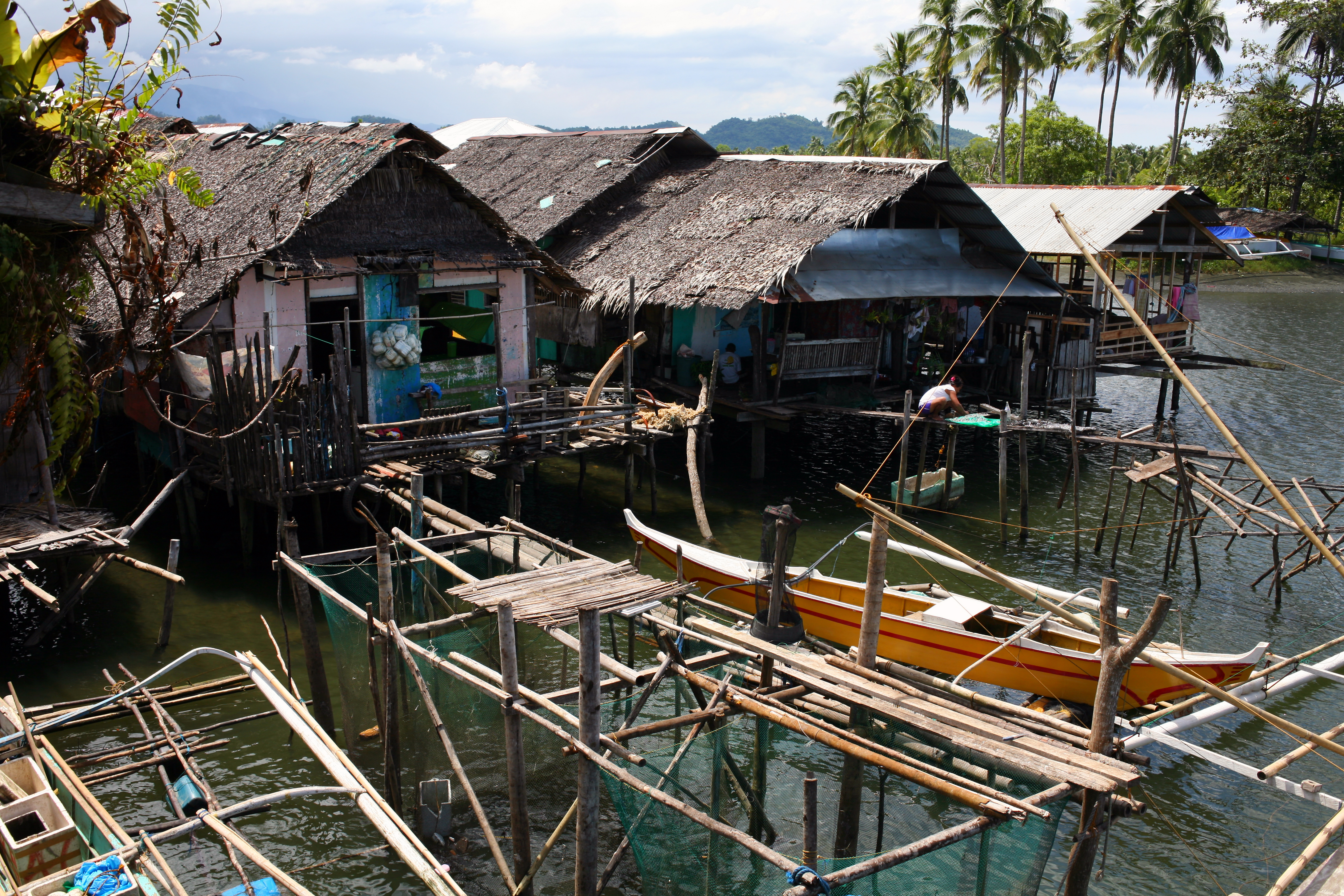 Tipiche abitazioni del tipo nipa hut e alcune barche da pesca chiamate bangka presso l'embarcadero di Cantilan, Surigao del Sur, Filippine